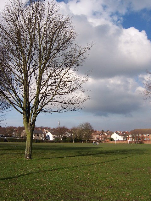 Puddy Dale, Heswall